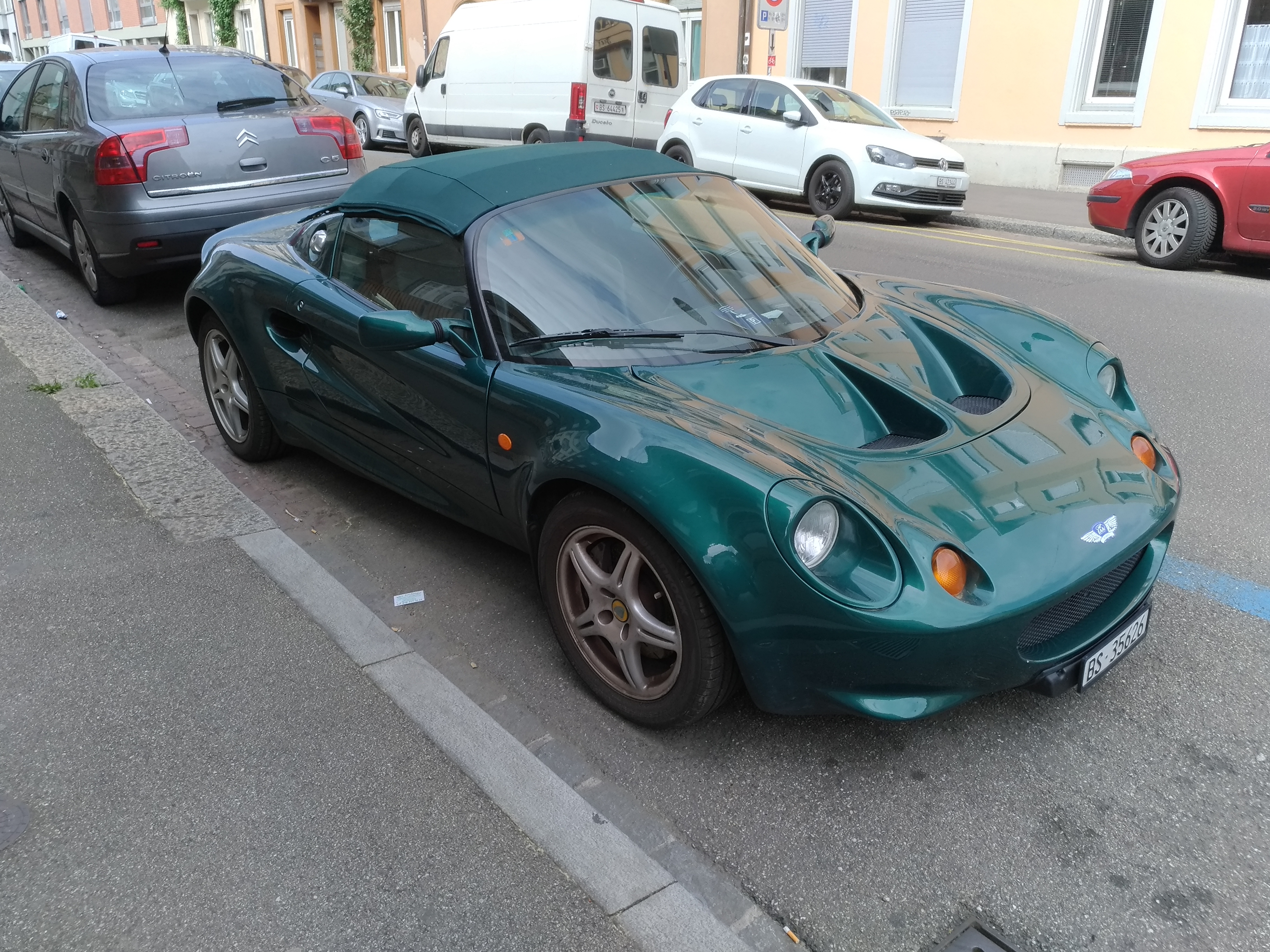 Lotus Elise 111S (1.8 145 hp) at Basel